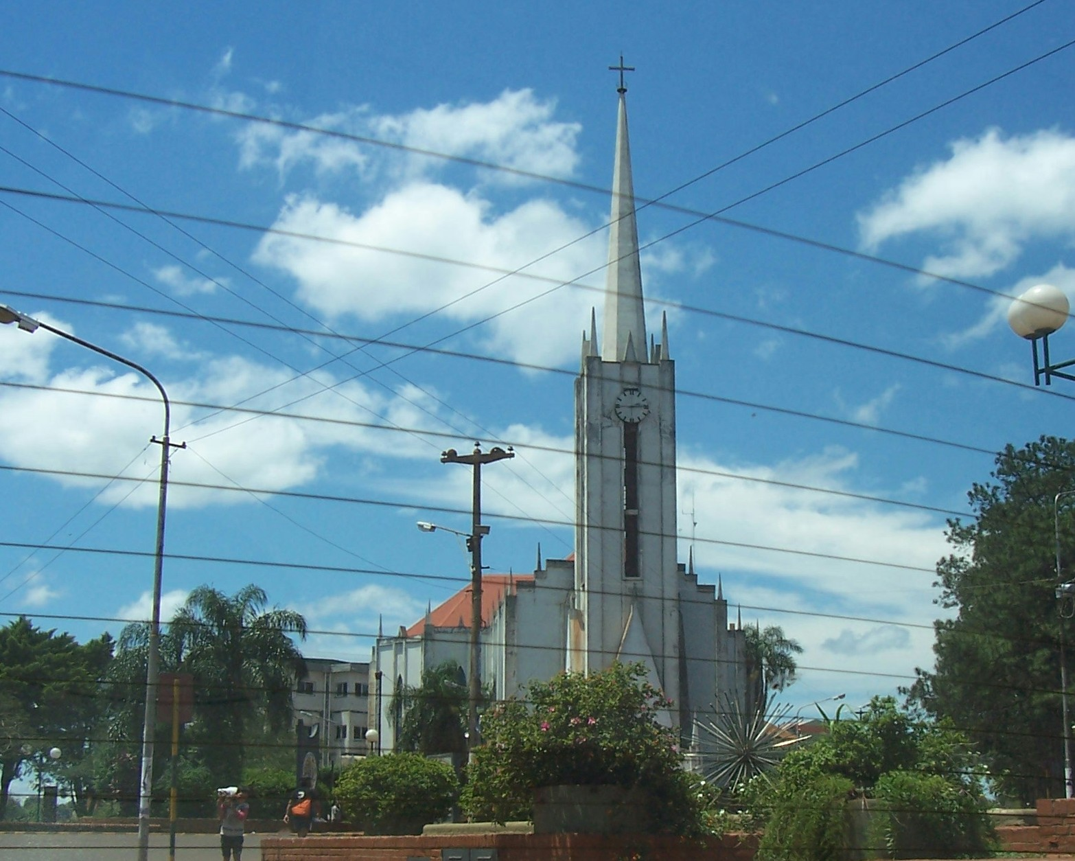 Foto de la Iglesia San Antonio, en el centro de la ciudad de Oberá.